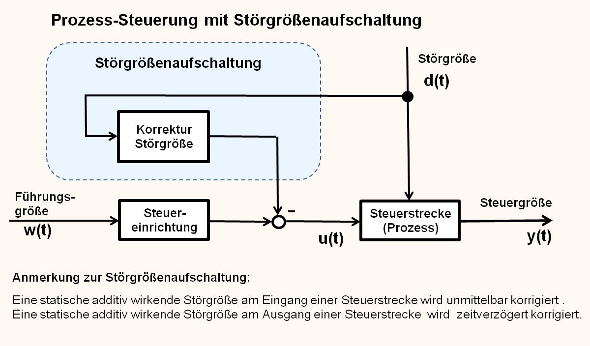 Signalflussplan einer Steuerung mit Störgrößenaufschaltung